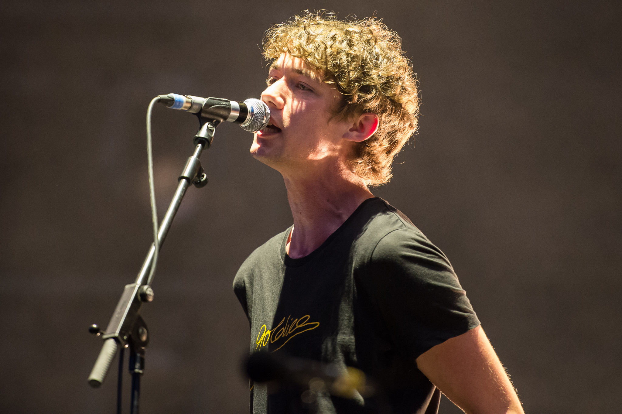 AMK,ARGO-Konzerte,AnnenMayKantereit,Beck's Park Stage,Henning May,Konzert,Livekonzert,Livemusik,Musik,RiP,Rock im Park 2017